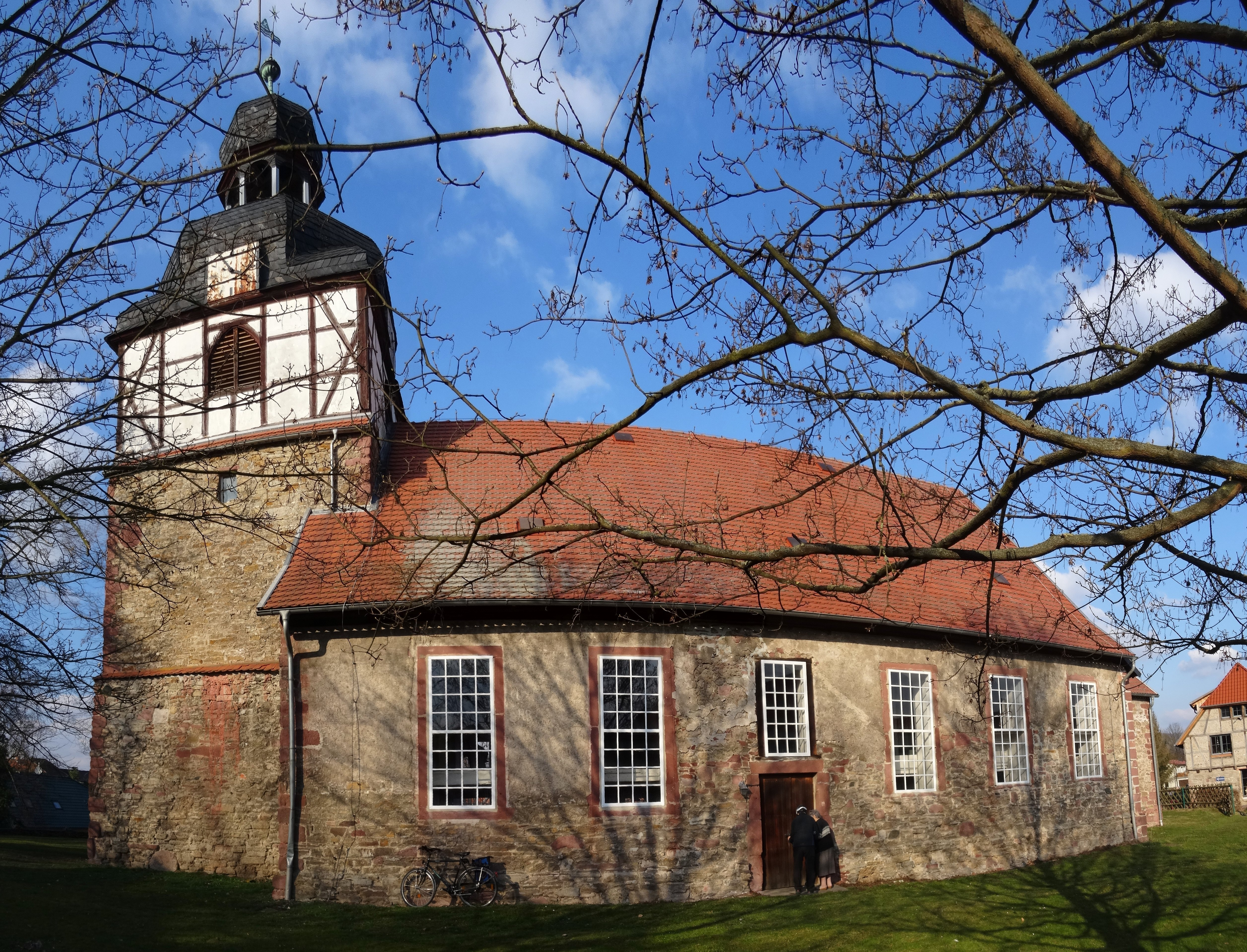 St. Andreaskirche, Uftrungen